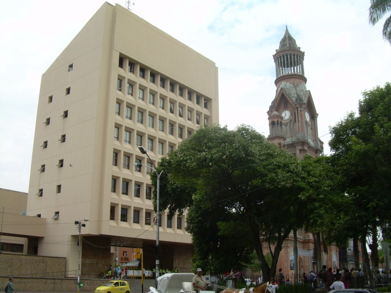 Alcaldía de Palmira, Valle del Cauca